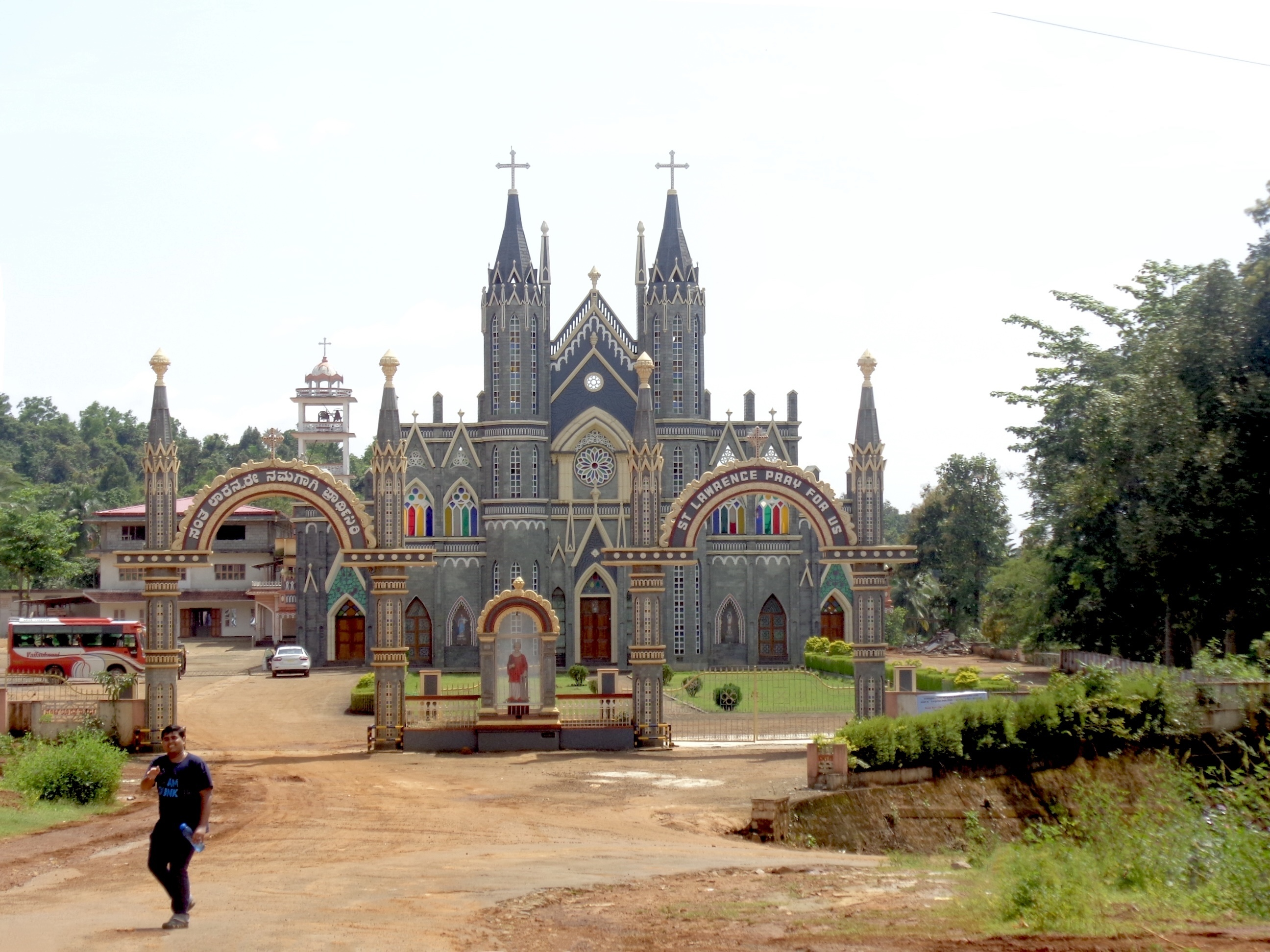 st Laurence chrurch, Attur north, Karkala, Karnataka, India